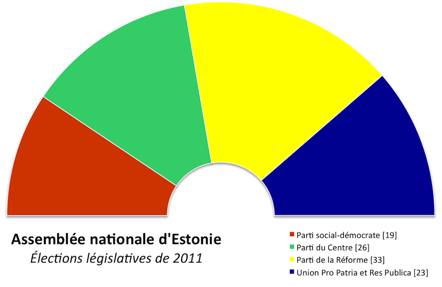 Composition politique de l'Assemblée nationale d'Estonie à l'issue des élections législatives de mars 2011.